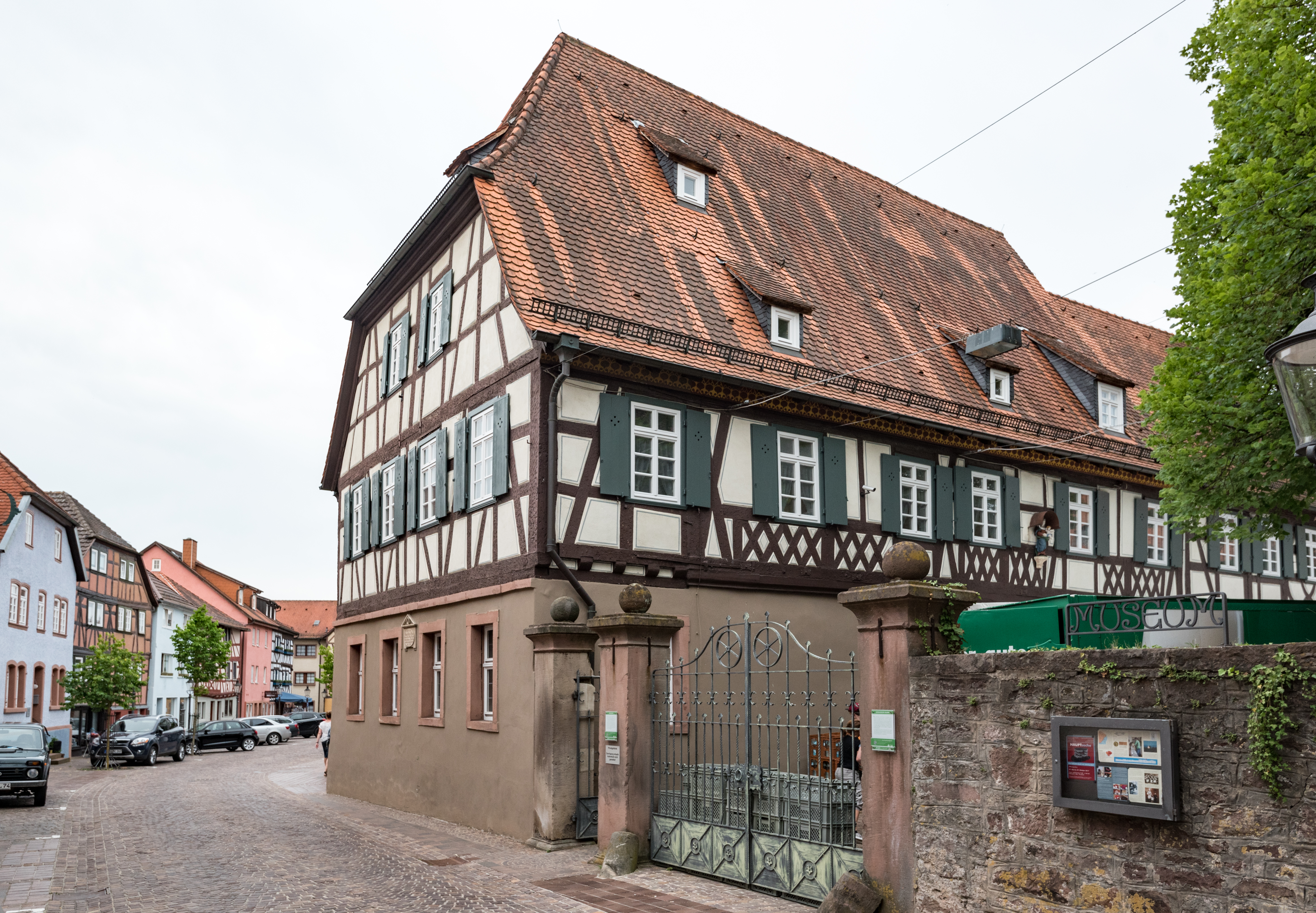 Buchen (Odenwald), Kellereistraße 27